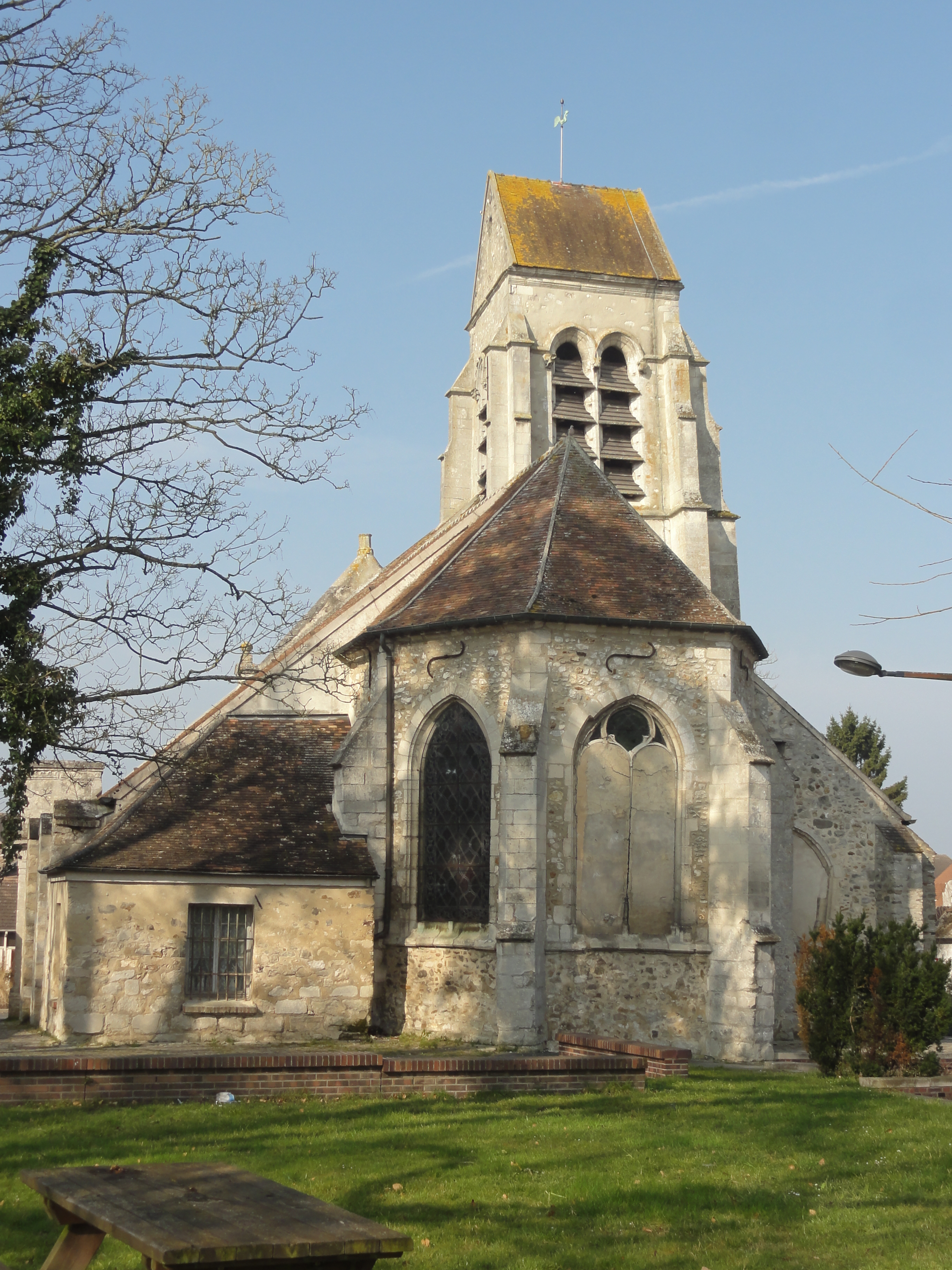 Vue depuis l'est.